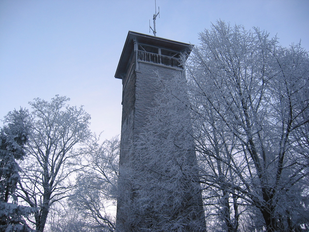 Der Weißenstein bei Stammbach im Winter 2003/2004.